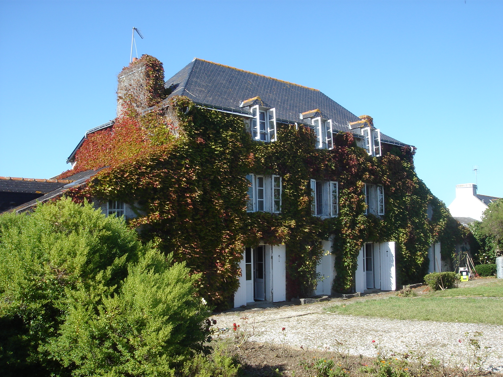 Château de Crawford construit en 1761 par le Major Crawford, ancien gouverneur de l'île de Belle-Île-en-Mer pendant l'occupation anglaise. Le domaine qui porte son nom avait été érigé en fief par Louis XV pour le remercier de la bonne façon dont il a traité ses sujets.